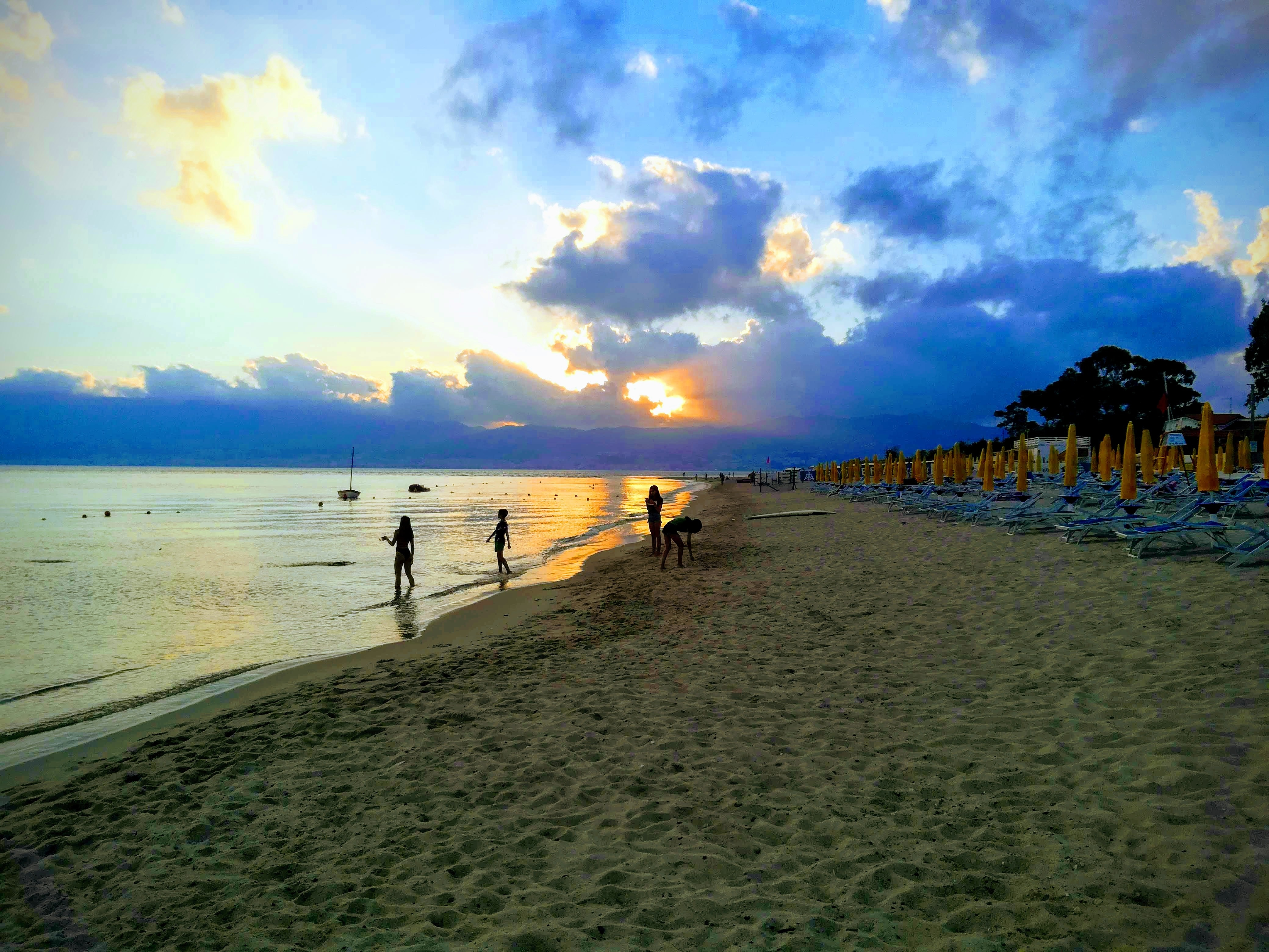 Spiaggia di Catona (Q55421141)